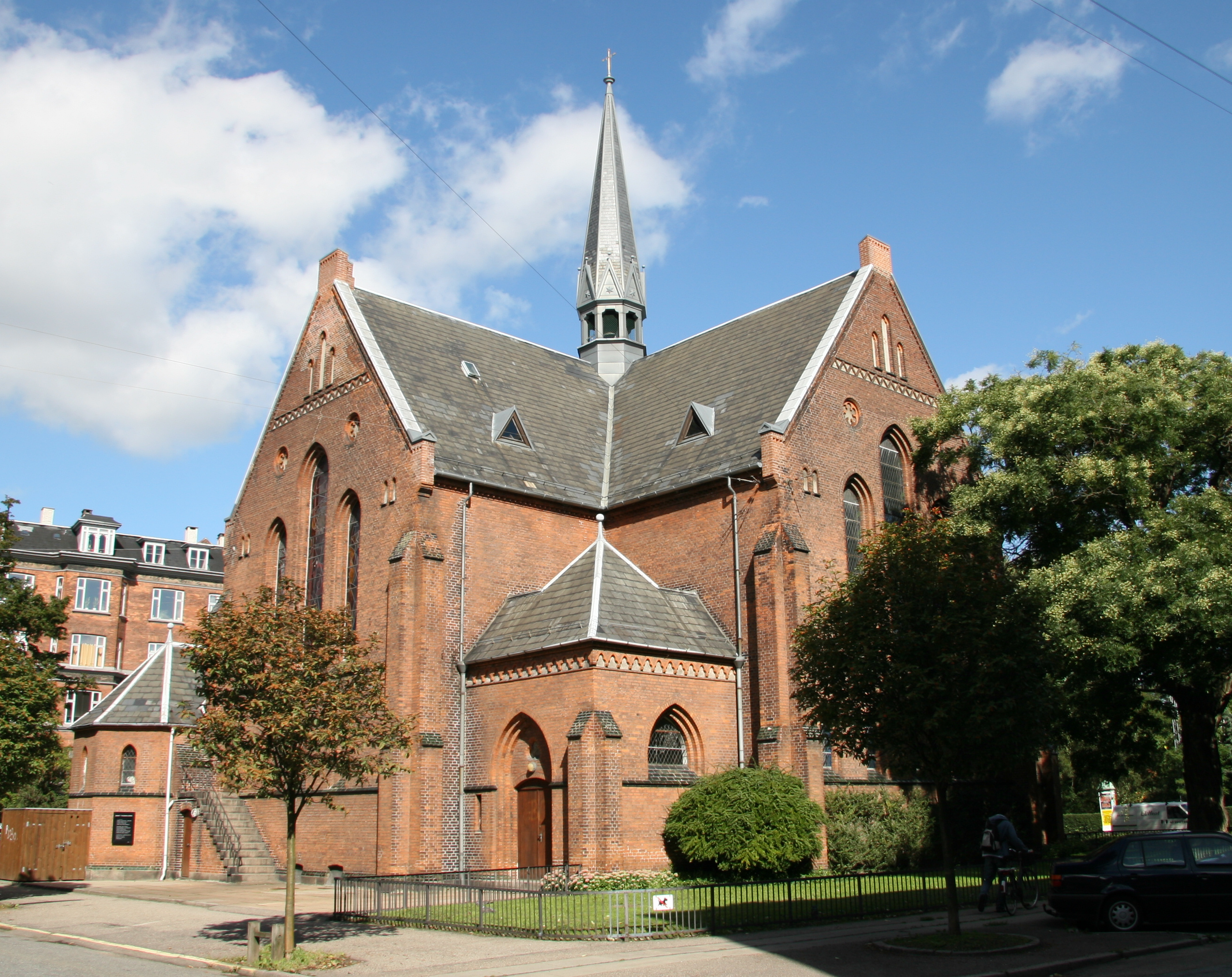 Sankt Thomas Kirke in Copenhagen, Denmark.